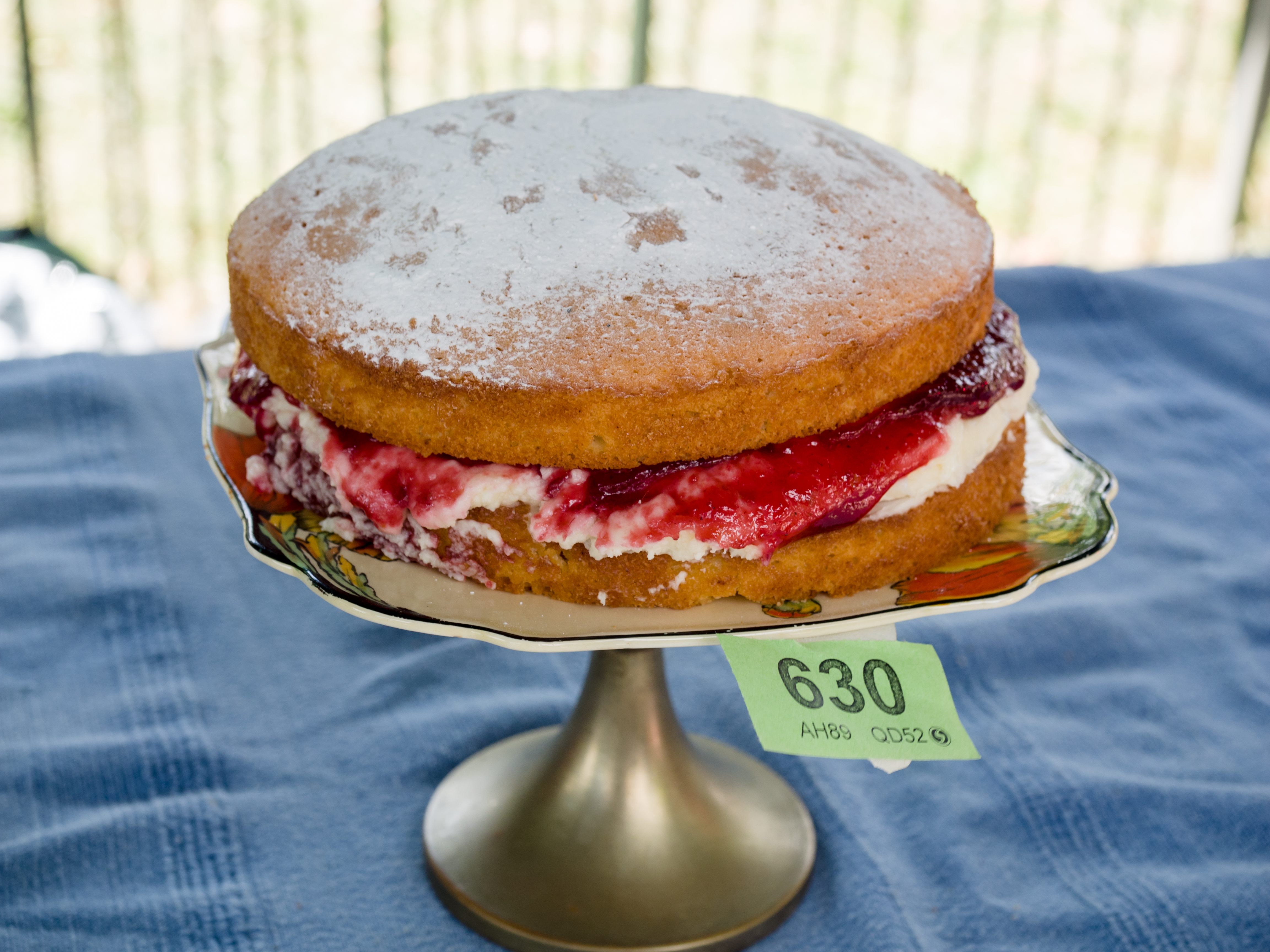 Ruskin Park fete 2014